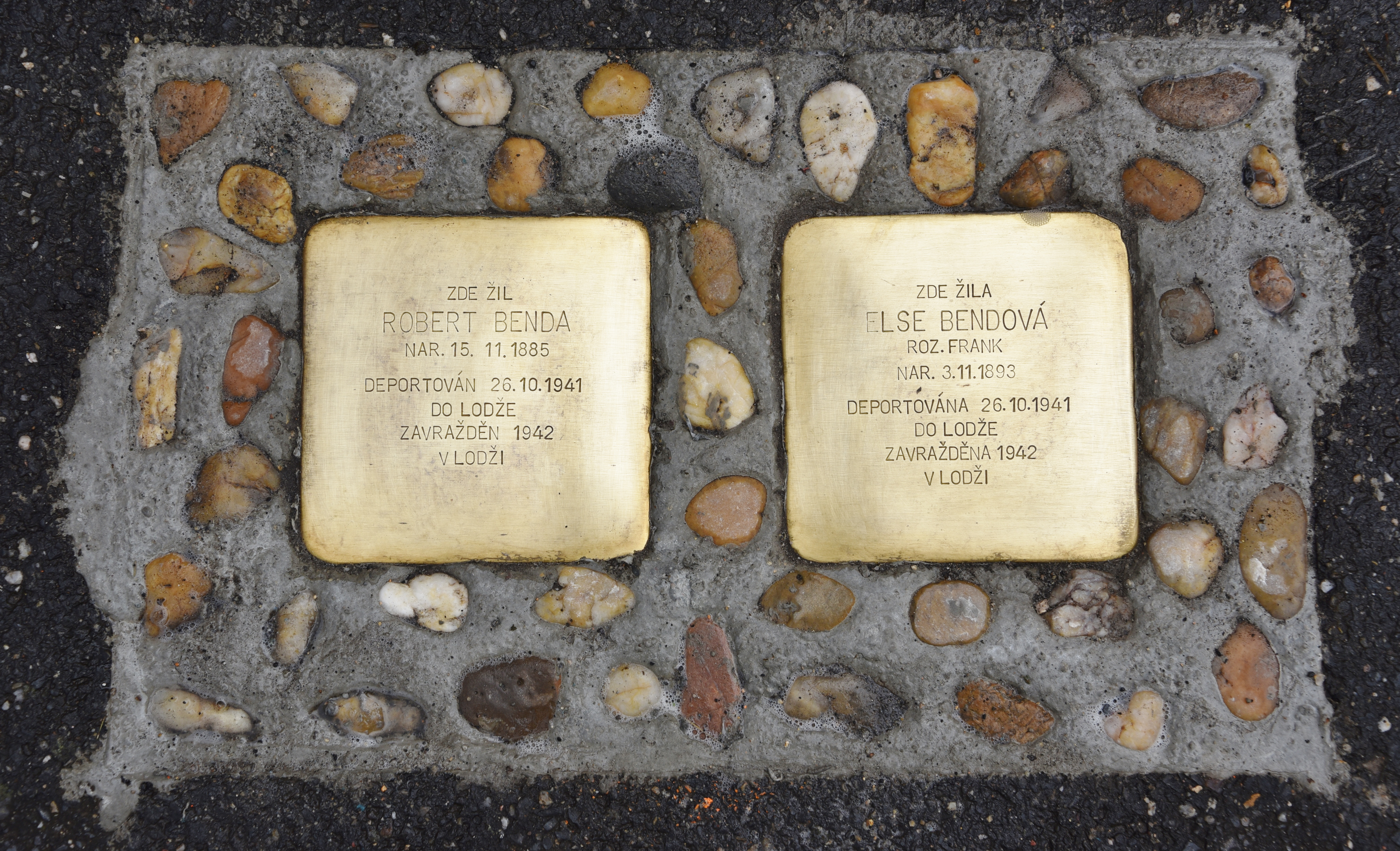 2 der in Liberec verlegten Stolpersteine